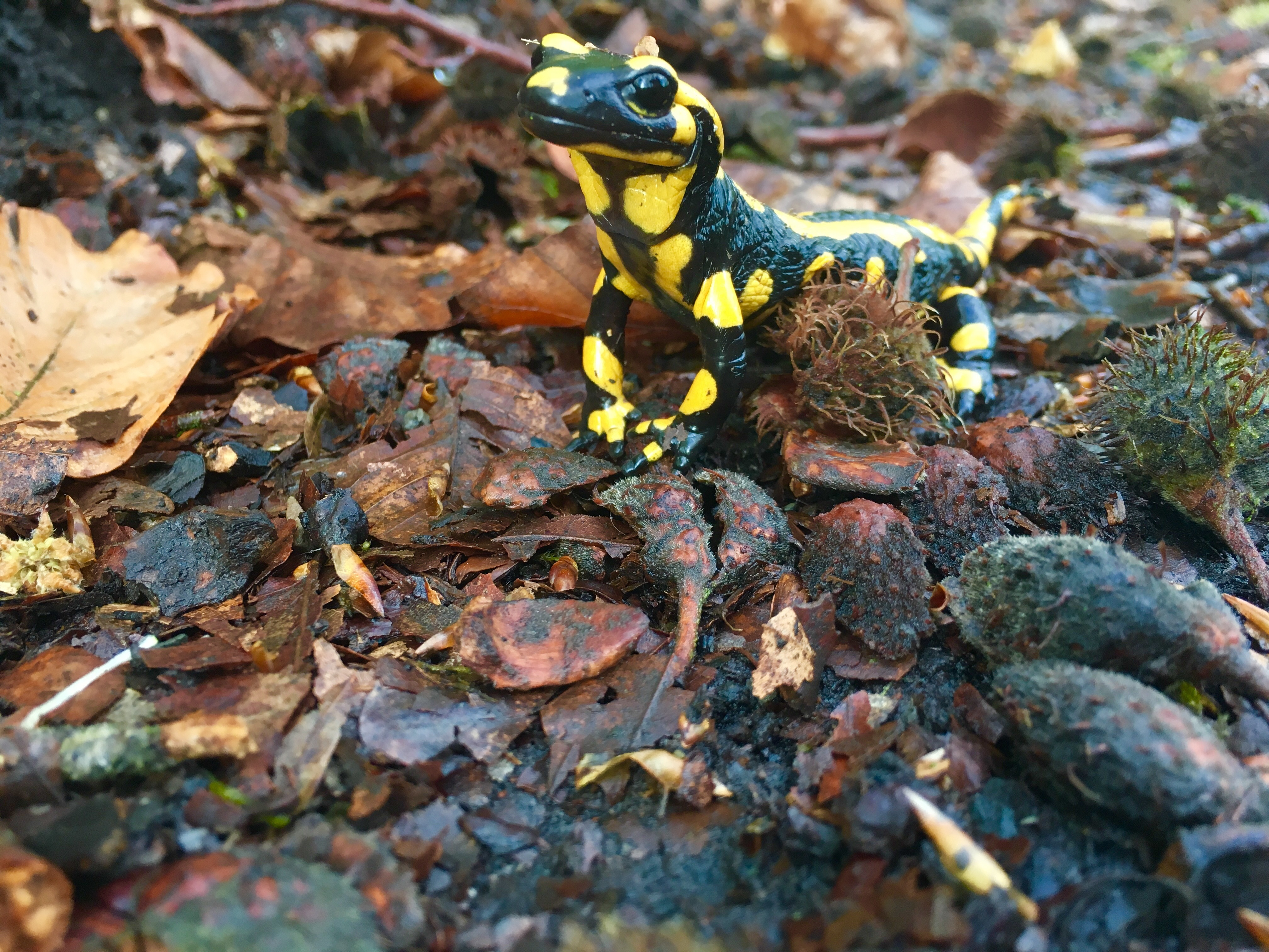 Feuersalamander